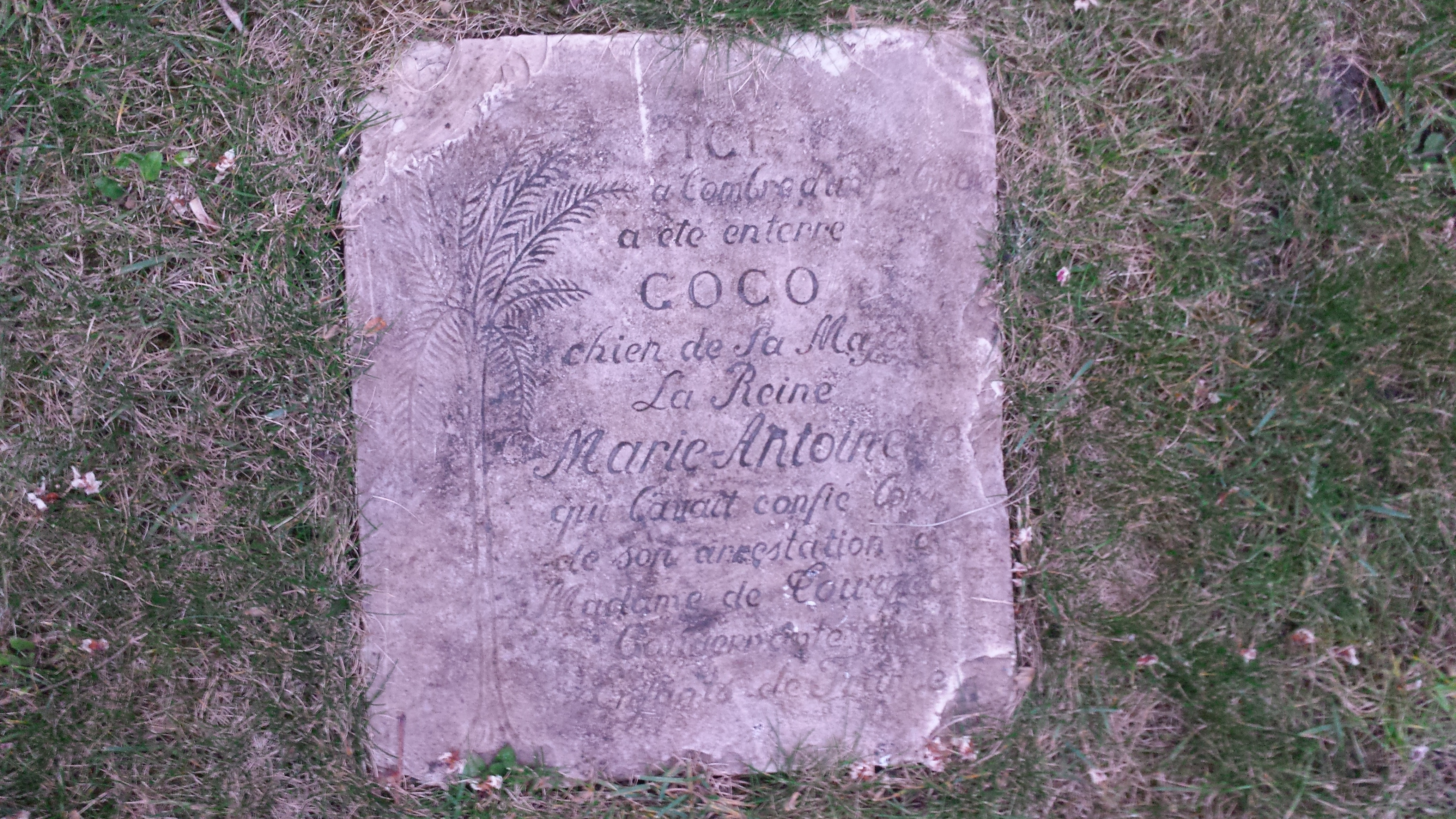 Stèle commémorative de Coco, dernier chien de Marie-Antoinette, dans le jardin de l'hôtel de Seignelay, 80 rue de Lille